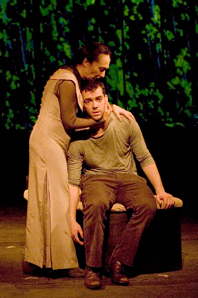 מתוך ההצגה רוחות. חוה אורטמן ויפתח אופיר בהצגה "רוחות|", "תמונע", 2009